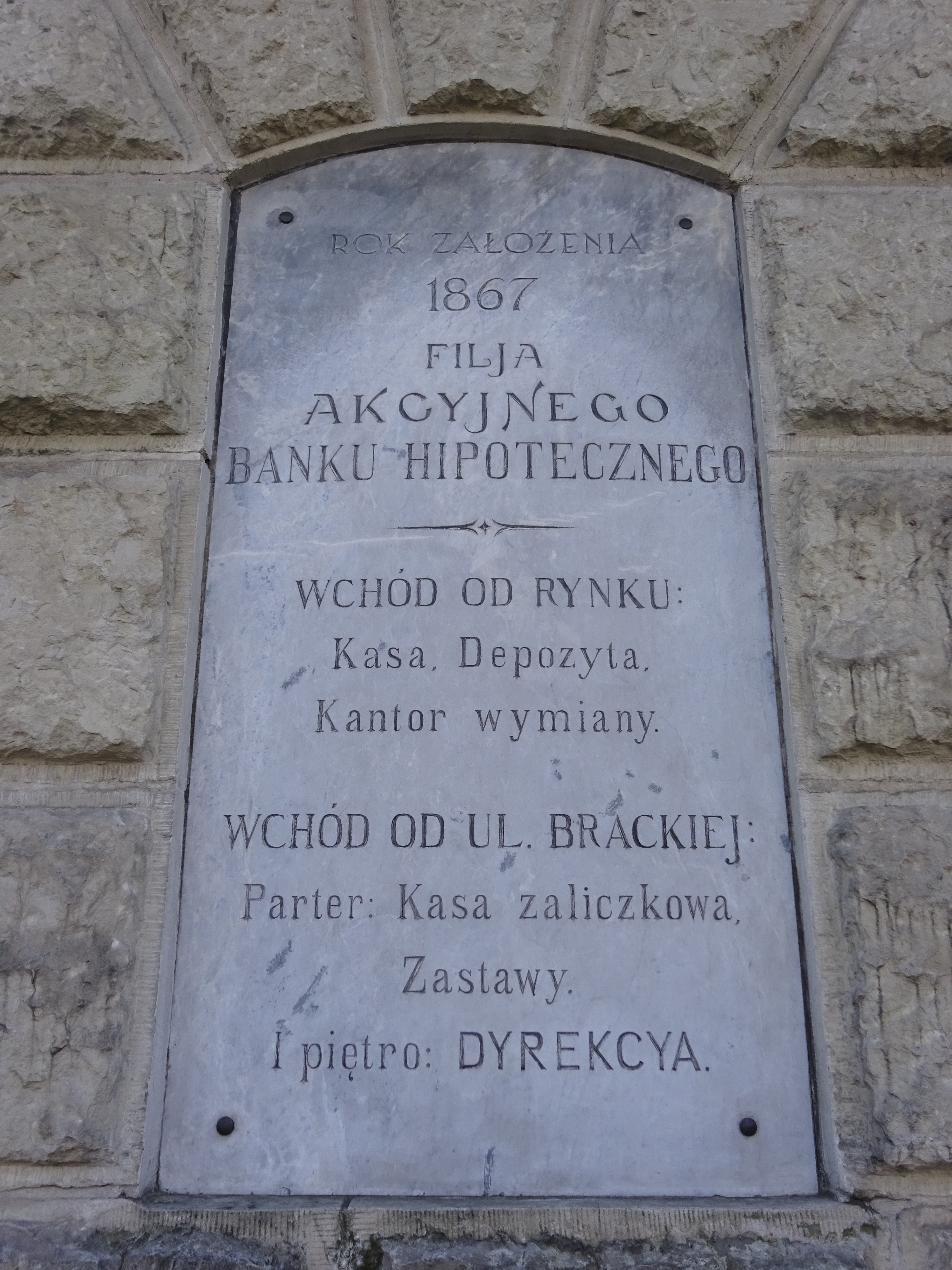 Tablica upamiętniająca założenie banku na parterze kamienicy pod Ewangelistami - Akcyjny Bank Hipoteczny (1867). Kraków, 2017.